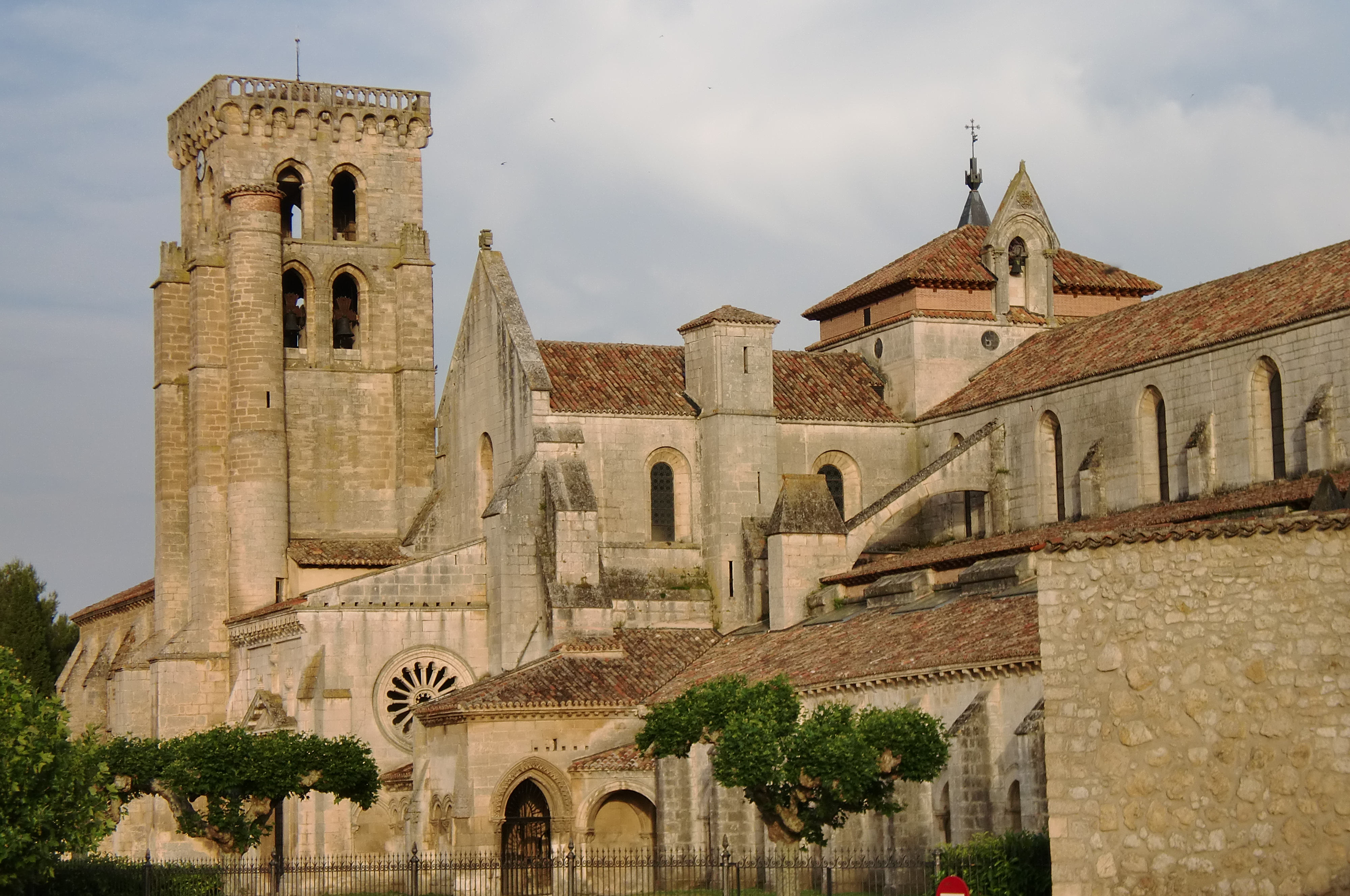 Monasterio de monjas cistercienses fundado por Alfonso VIII y su esposa doña Leonor